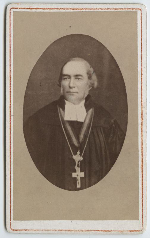 Portree: Leopold Bernhard Rinne